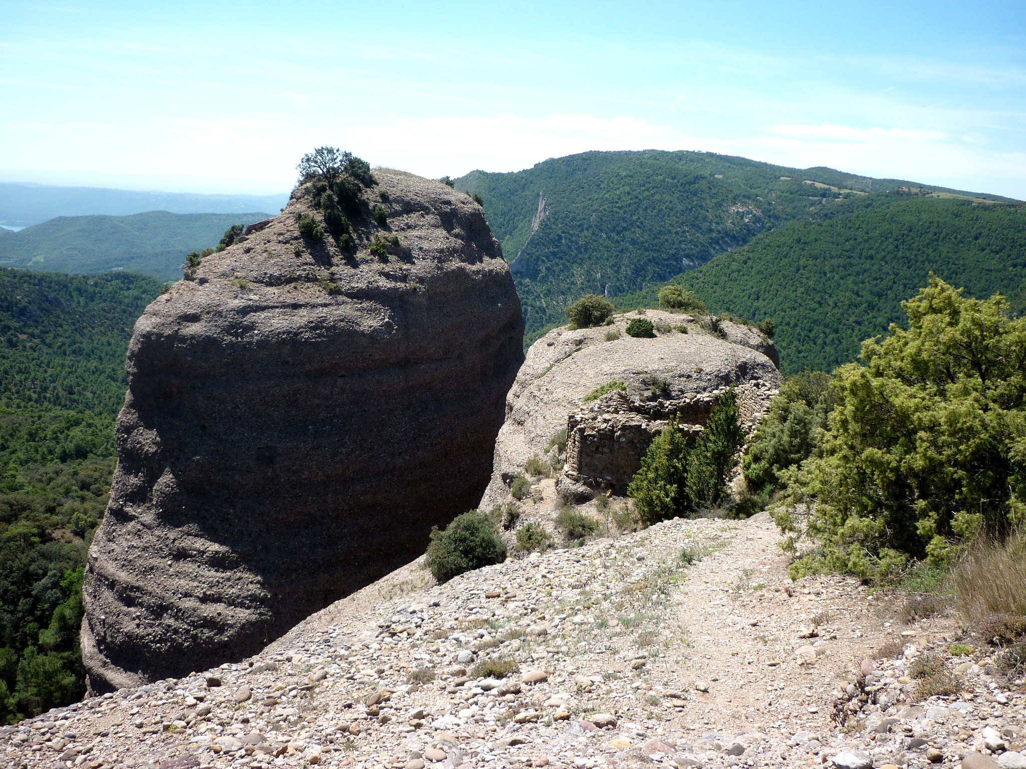 Sant Salvador del Corb (Peramola) This is a a photo of a natural area in Catalonia, Spain, with id: ES510175